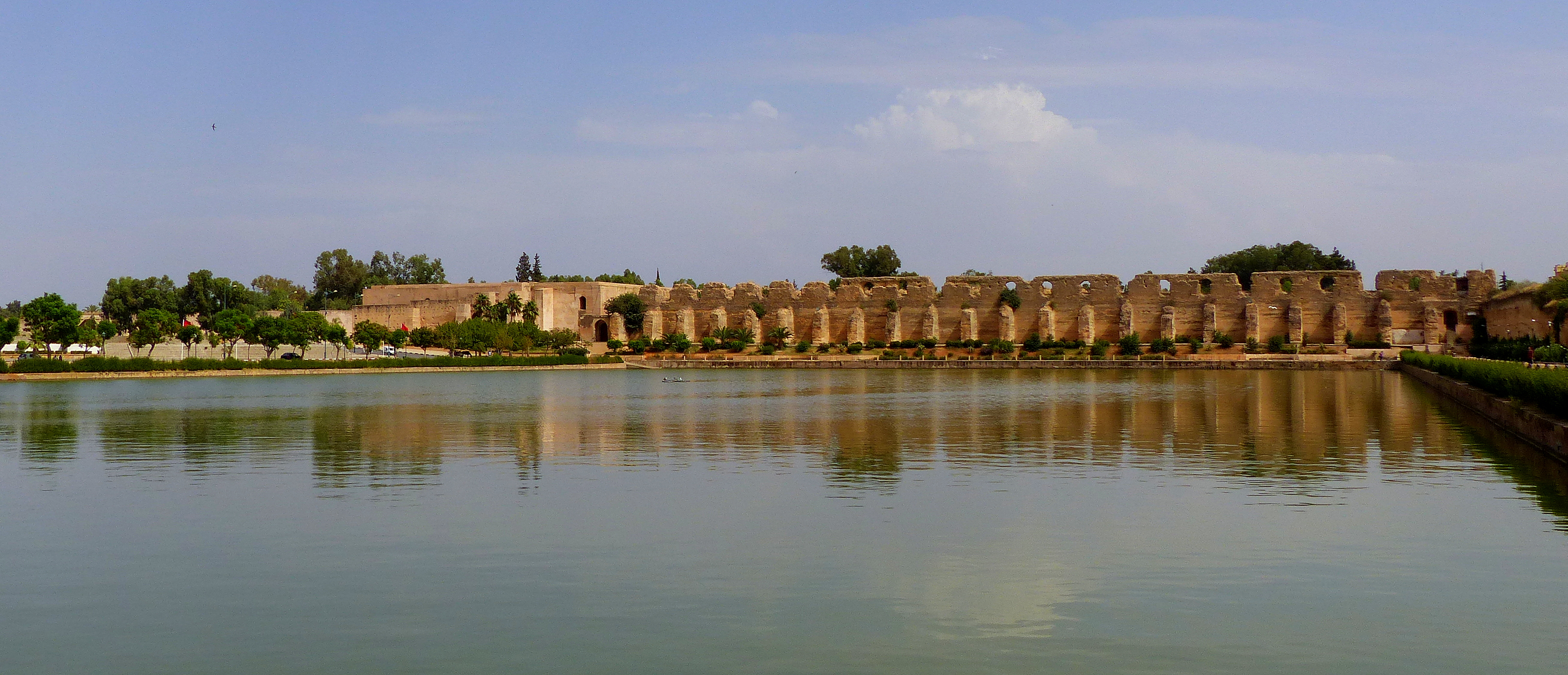 C'est un grand bassin qui assurait l'alimentation en eau de toute la ville surtout en cas de siège ou de sécheresse. Il offre un espace de promenade très agréable et rafraîchissant aussi bien pour les nationaux que pour les touristes, qui auront la possibilité de découvrir aussi les écuries et les greniers (Hri swani) jadis de Moulay Ismaïl.